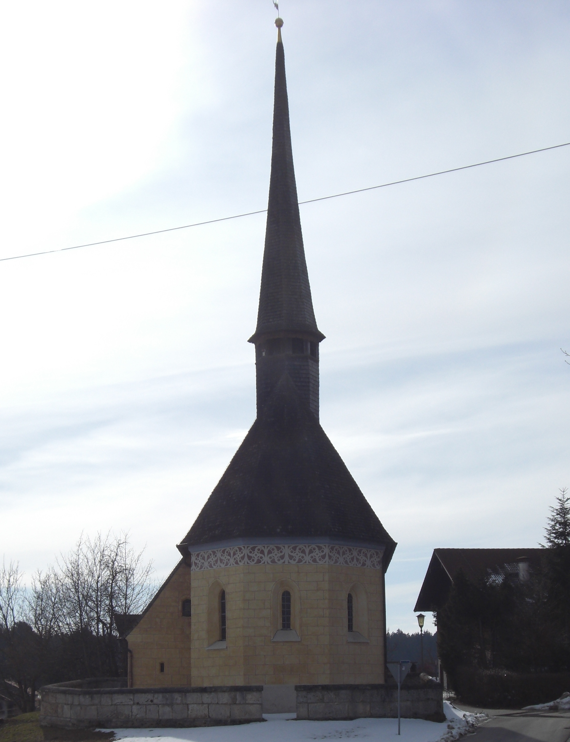 Filialkirche Heilig Kreuz in Wettlkam